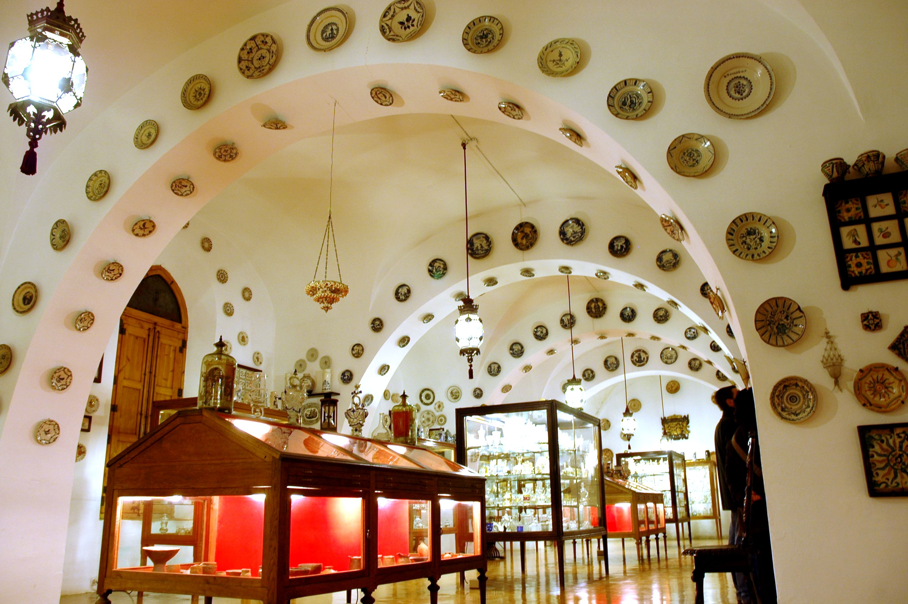 Peralada - Convent del Carme - Museu del vidre